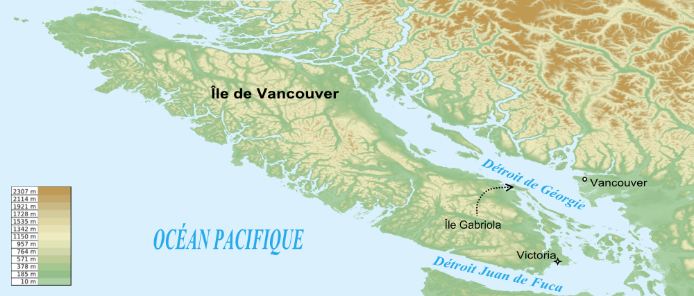 Sujet : Localisation de l'Île Gabriola sur une carte du sud-ouest de la Colombie-Britannique au Canada. Origine des données cartographiques : site FTPdu SRTM (Shuttle Radar Topography Mission) de la NASA. Visualisation des données : logiciel 3DEM de Visualization Software LLC. Projection : données non modifiées. Logiciels de dessin utilisés : . Inkspace pour l'écriture du texte des principales légendes. Format : PNG. Didacticiel utilisé : Carte réalisée en s'aidant d'un didacticiel de Sting.